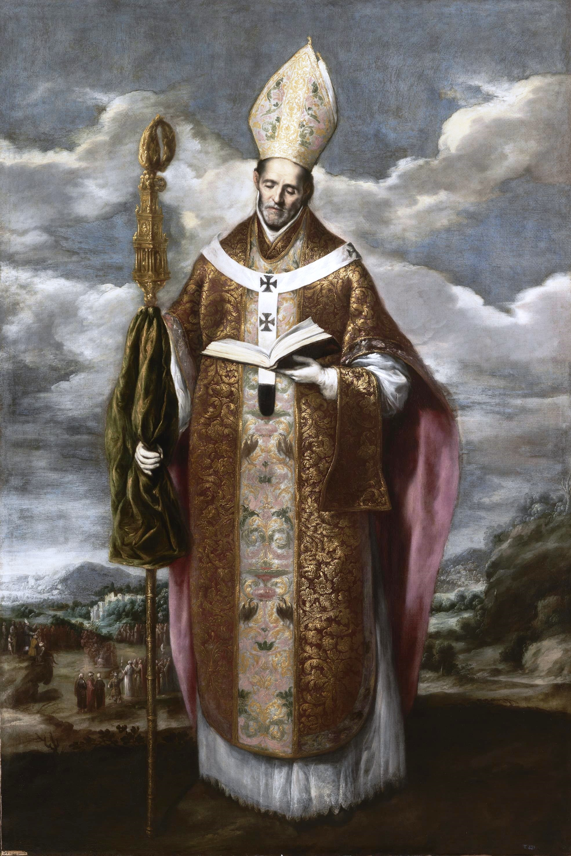 La obra representa a San Basilio Magno, obispo de Cesarea.